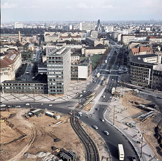 Blick vom Telefunken-Hochhaus am Ernst-Reuter-Platz auf die Hardenbergstraße in Berlin-Charlottenburg.